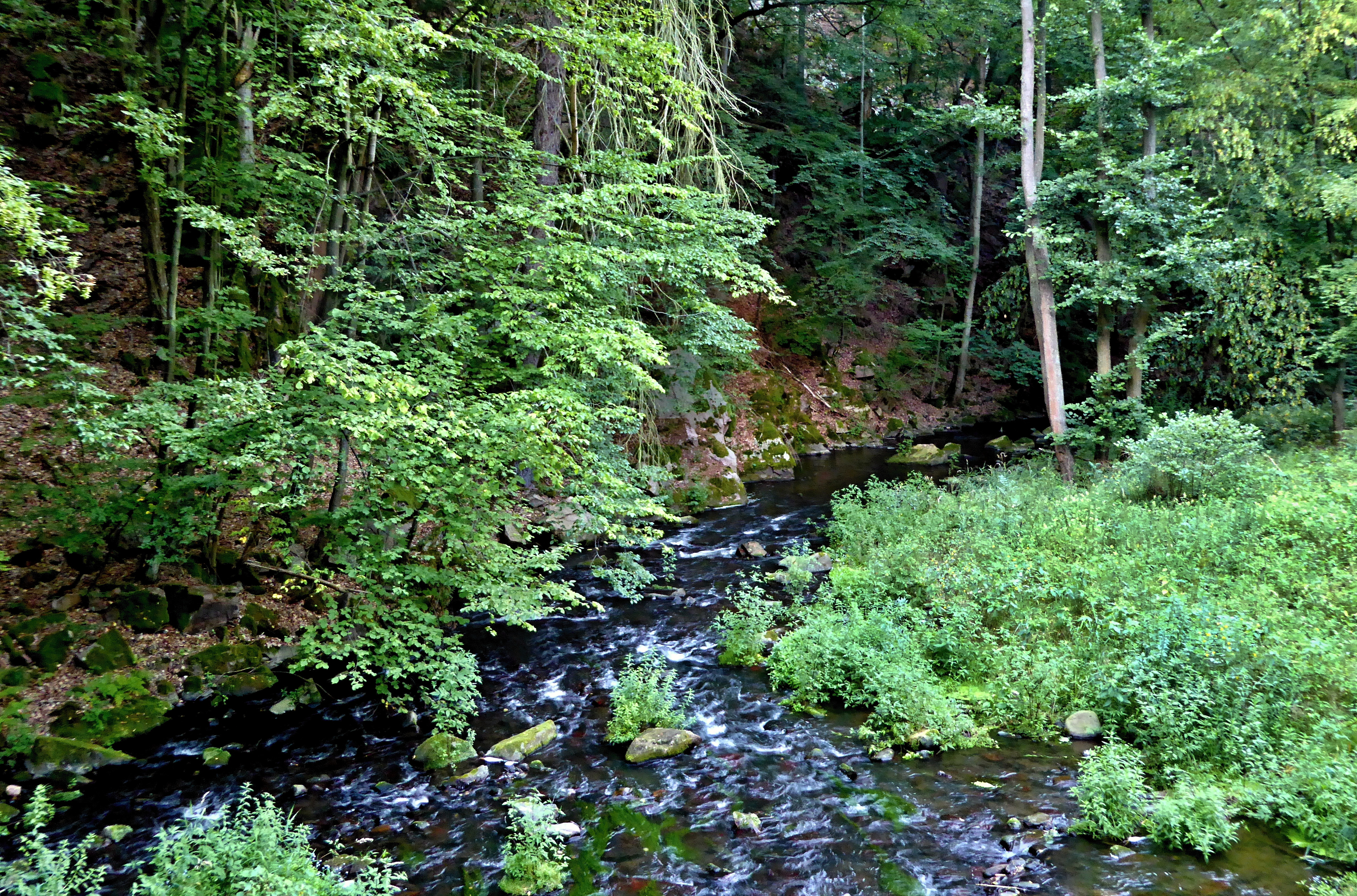 Kaňon v Přírodní rezervaci Strádovské Peklo s balvanitým korytem řeky Chrudimky a prudkými svahy se skalními výstupy a sutěmi nabízí turistům romanticky laděnou podívanou a vegetaci extrémní podmínky pro život.